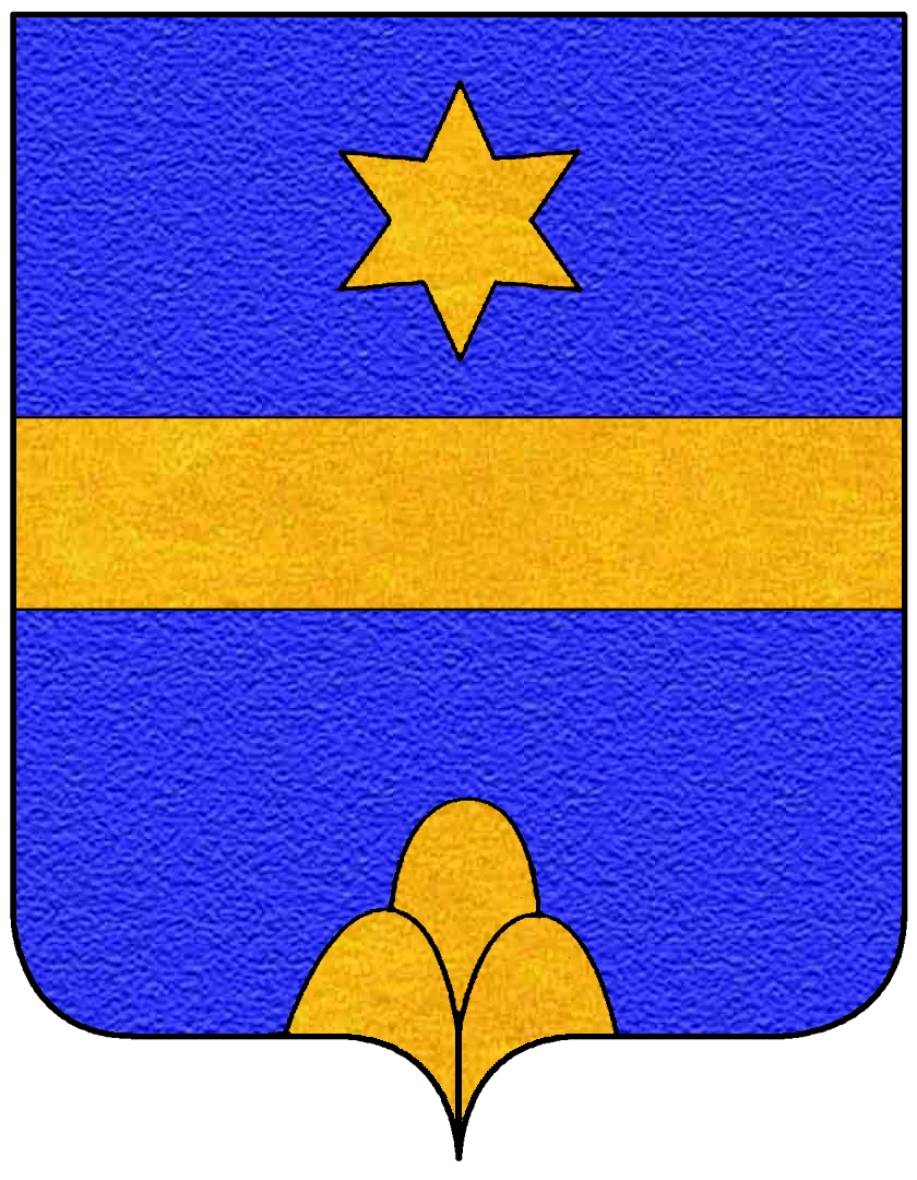 Stemma della famiglia Albani